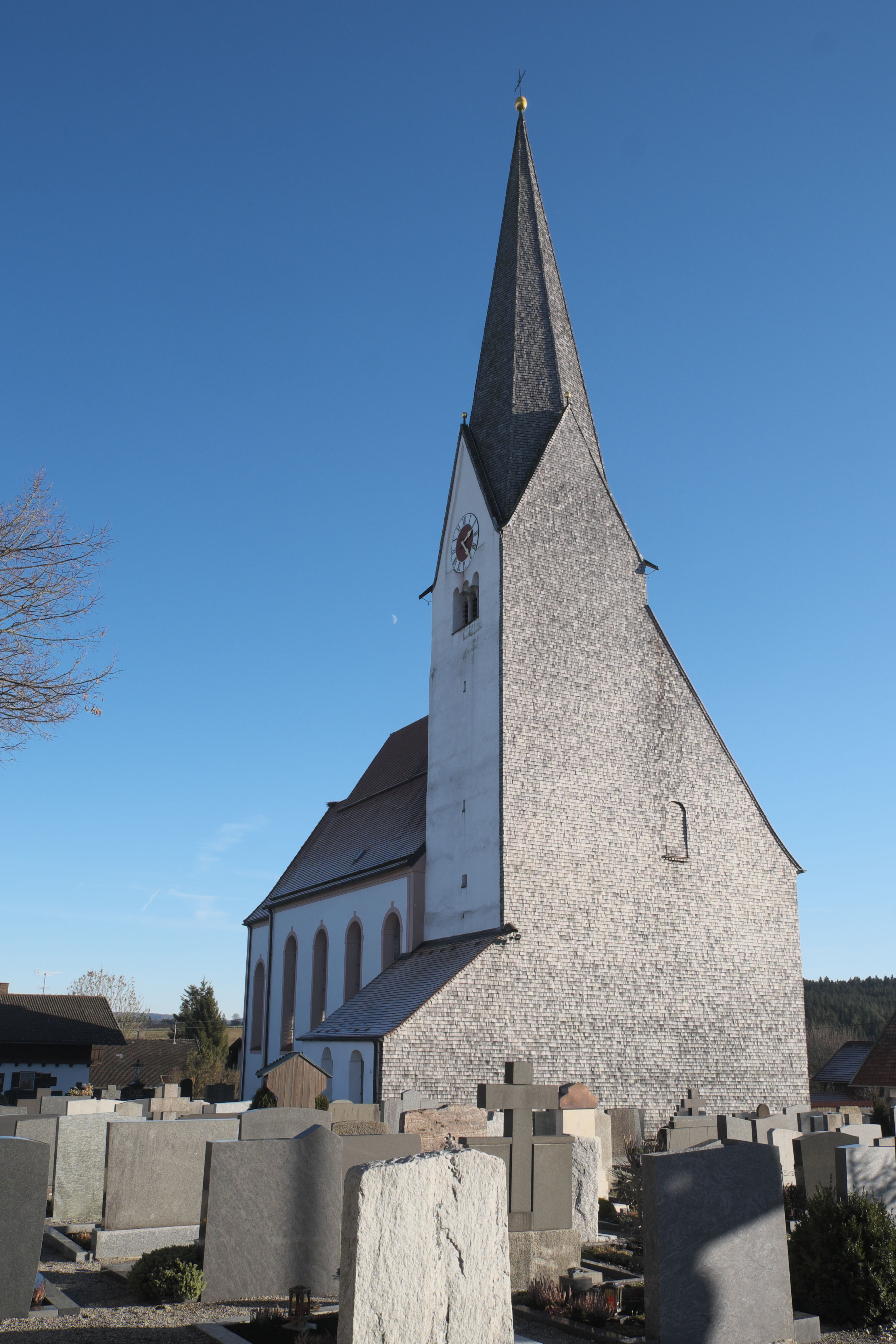 Katholische Pfarrkirche St. Stephan in Burggen im oberbayerischen Landkreis Weilheim-Schongau (Bayern/Deutschland), Westfassade